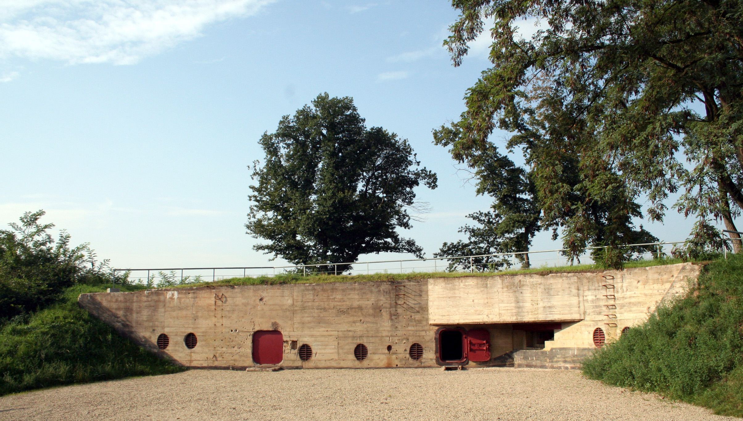 Eingangshof des B-Werk in Besseringen